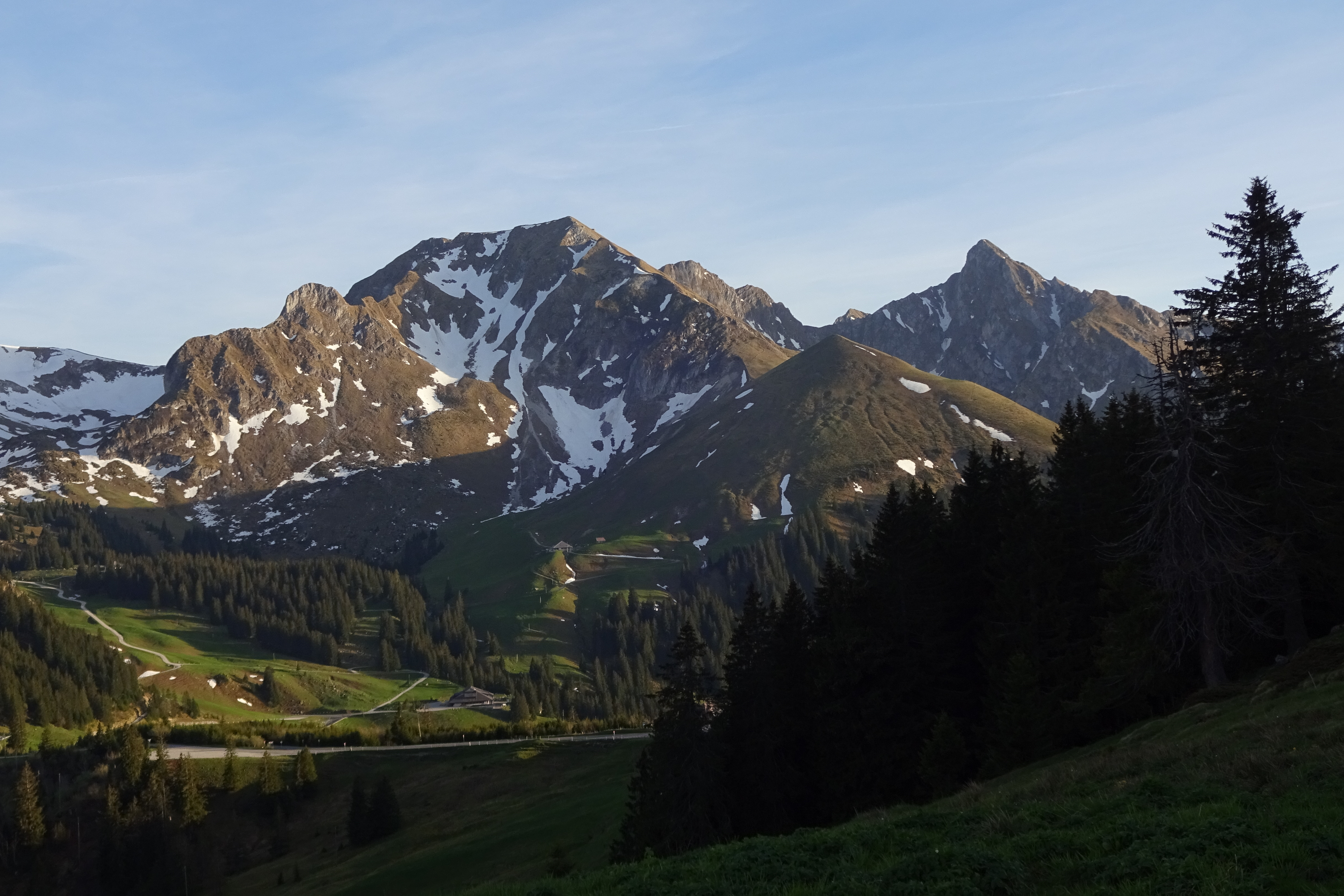 Naturpark Gantrisch (Nr. 1011P) – Gantrischkette von Norden: Kummlispitz (links), Bürglen (Mitte links), Gemsfluh (Mitte rechts) & Ochsen (rechts) _ Aufnahmestandort: Rüeggisberg (Exklave Nünenenalp), Gurnigel Stierenberg/Wasserscheide, am Selibühl-Rundweg – 46°43'49.24" N / 7°26'36.64" O